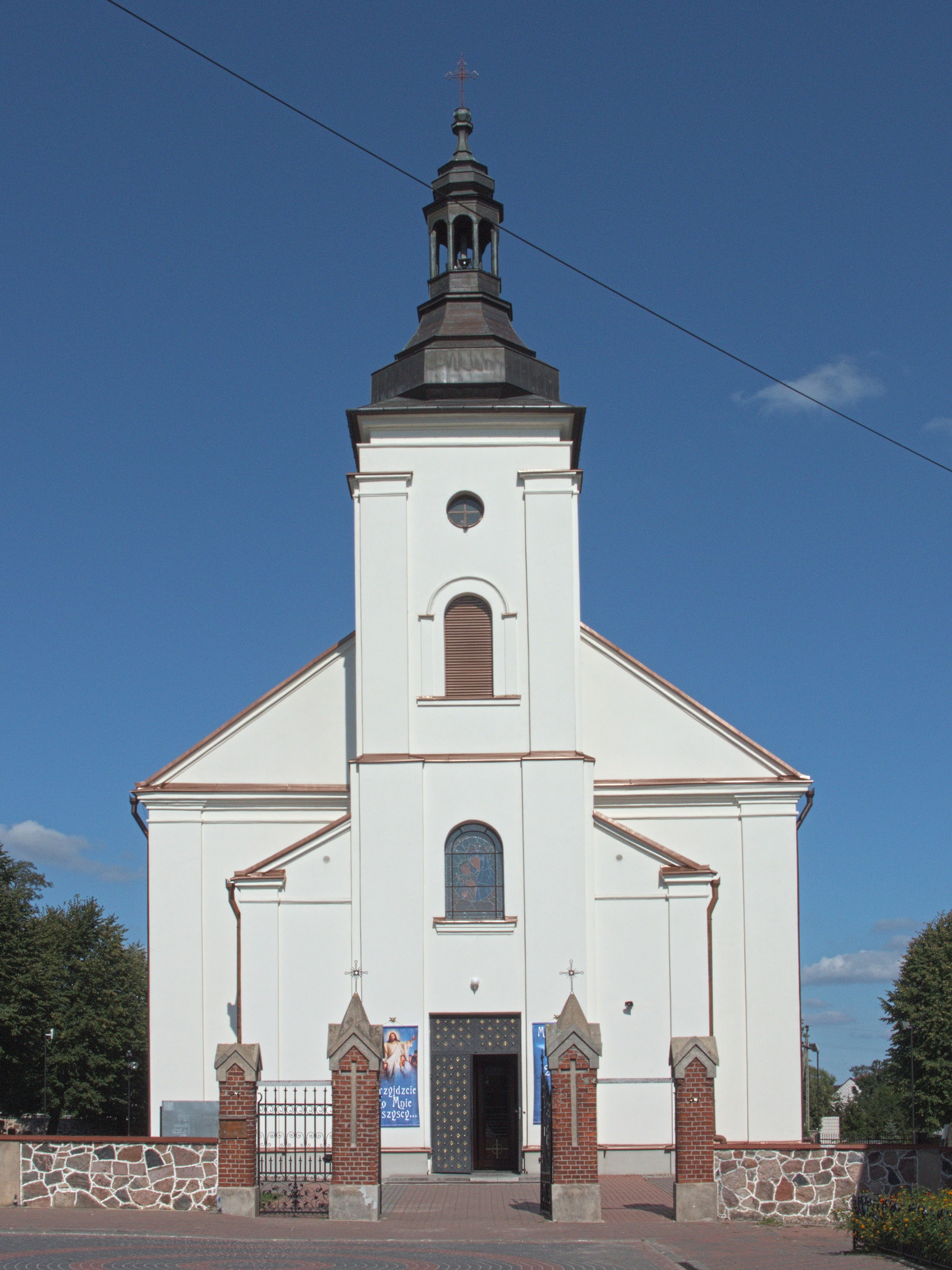 Kościół parafialny pw. Wniebowzięcia Najświętszej Maryi Panny w Brańsku.